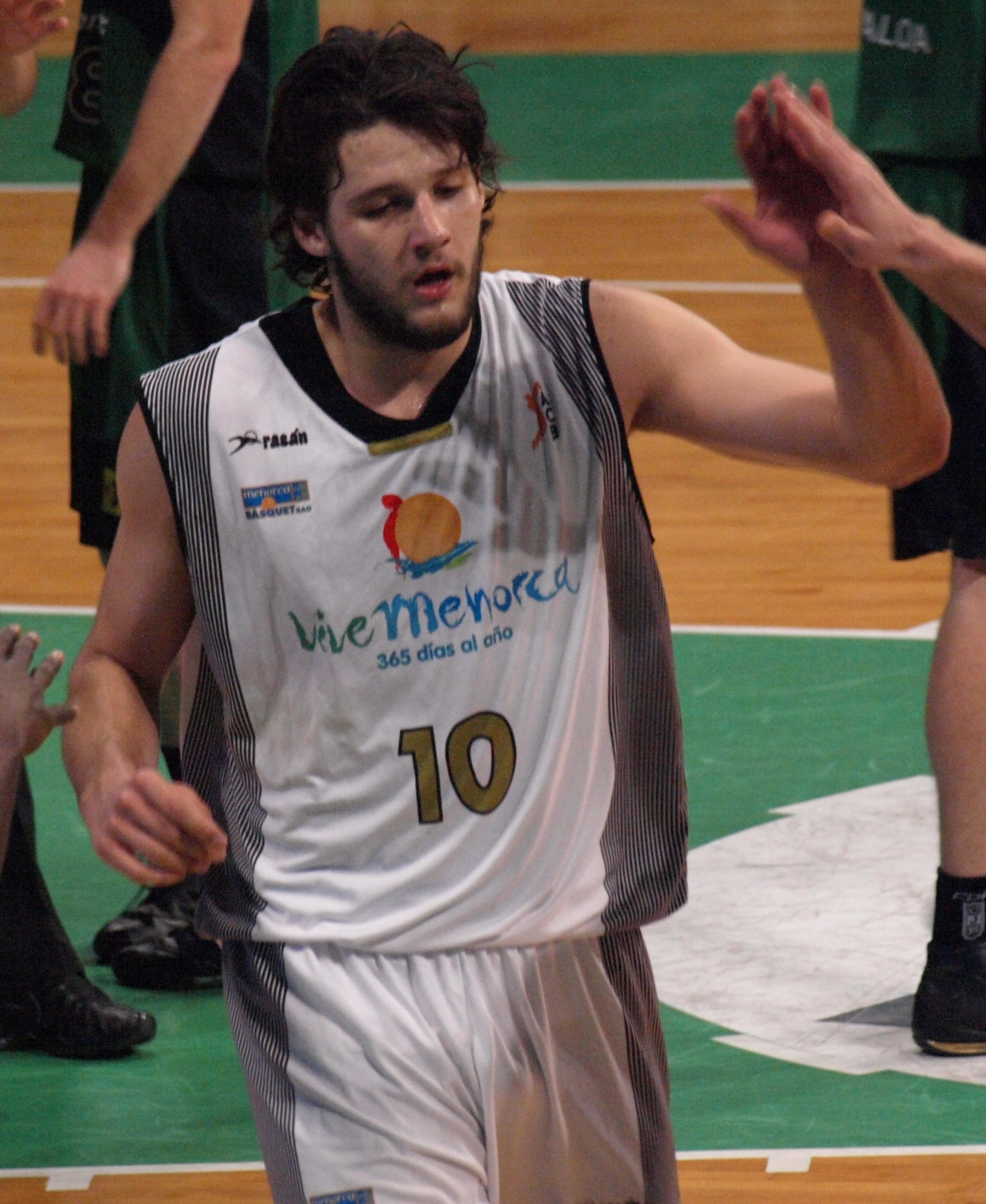 Kaloyan Ivanov, en el partido que enfrentó al Vive Menorca y al DKV Joventut de liga ACB en el Olímpico de Badalona en enero de 2009.